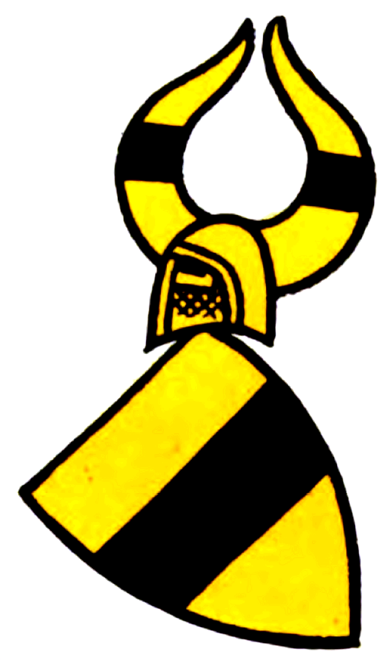 Wappen der Rotberg (hier als Rietberg benannt)